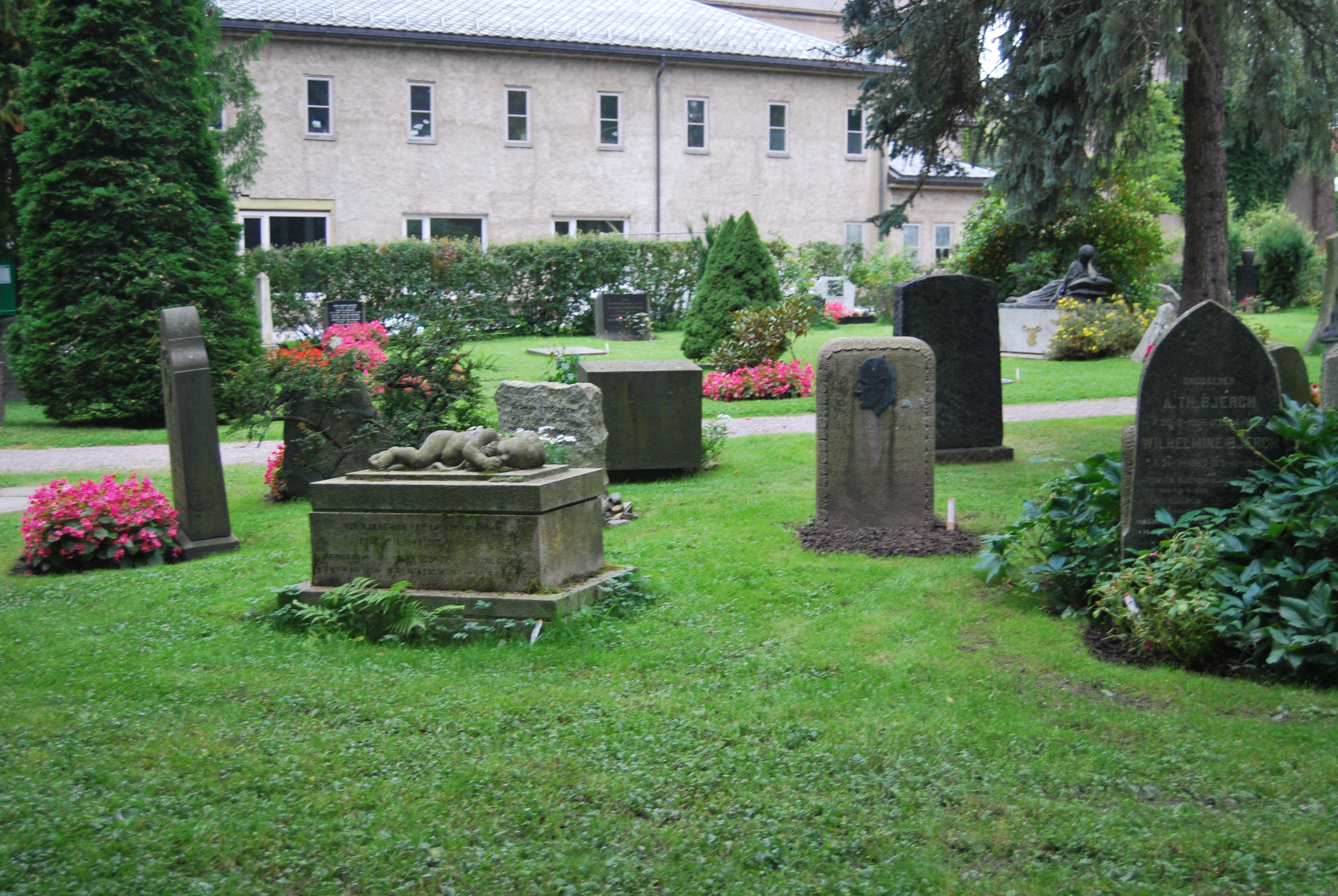 Vestre gravlund.Cmentarz.